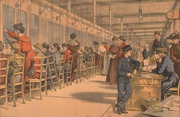 Les demoiselles du téléphone, aspect d'un bureau téléphonique parisien vers 1900.